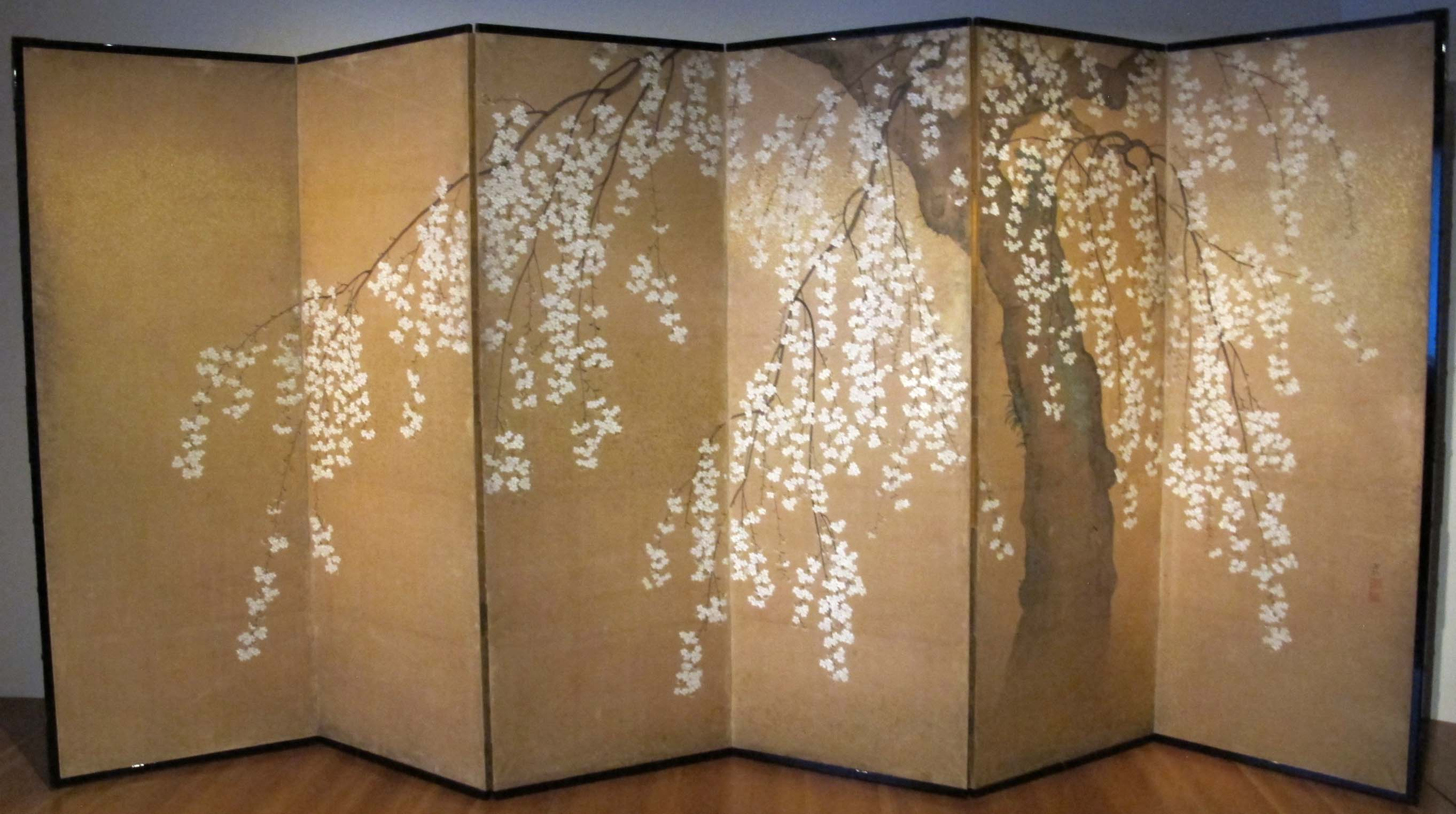 Edo, hara zaimei, paravento con ciliegi piangenti in fiore, 1810 ca.